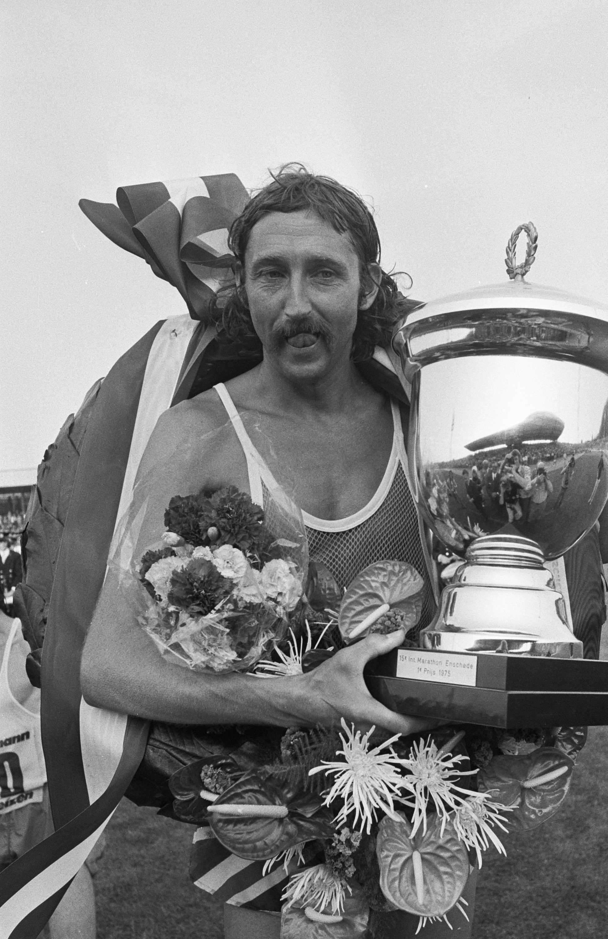 De Marathon van Enschede 1975. De kampioen Ron Hill met zijn beker